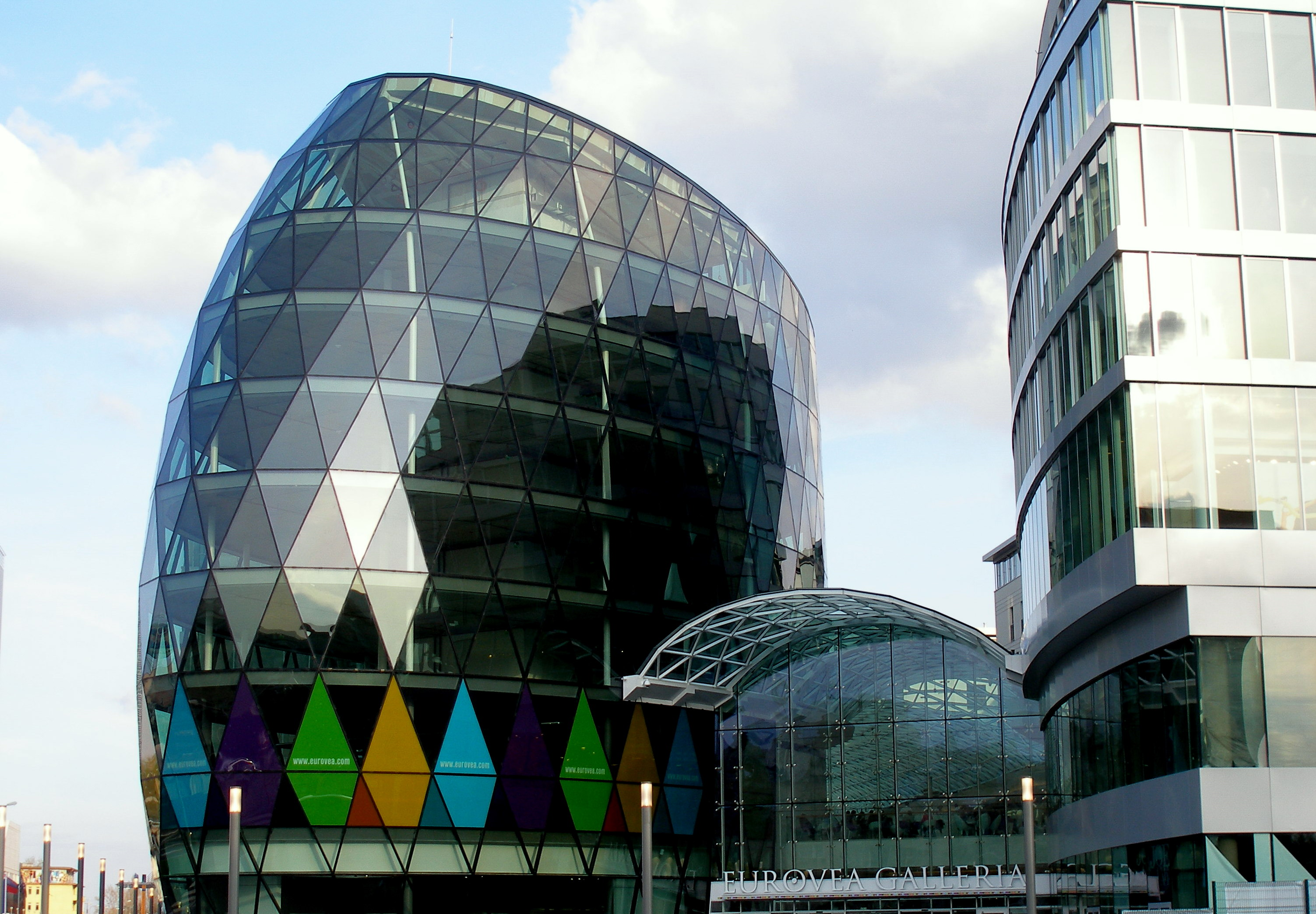 Bratislava. Nová bratislavská štvrť Eurovea.